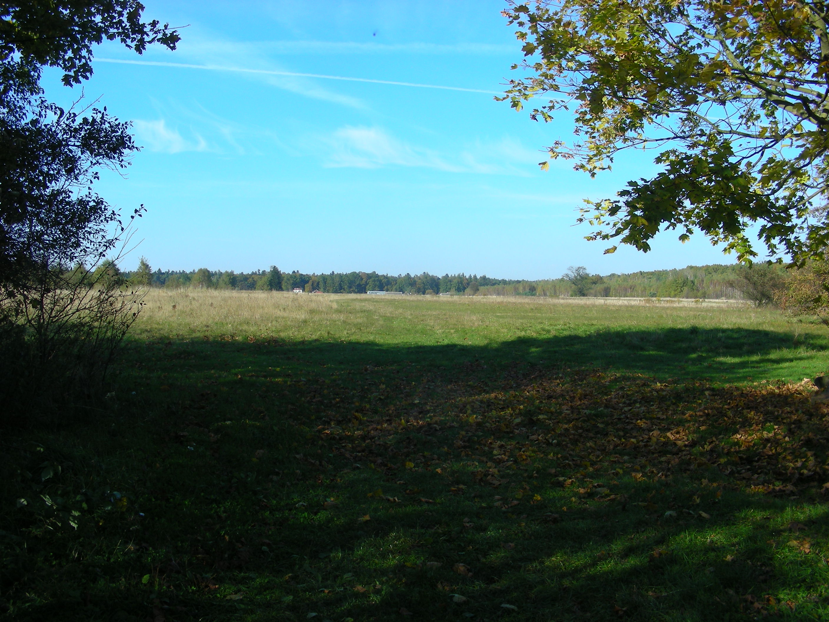 Wola Rafałowska, Poland, mazowieckie